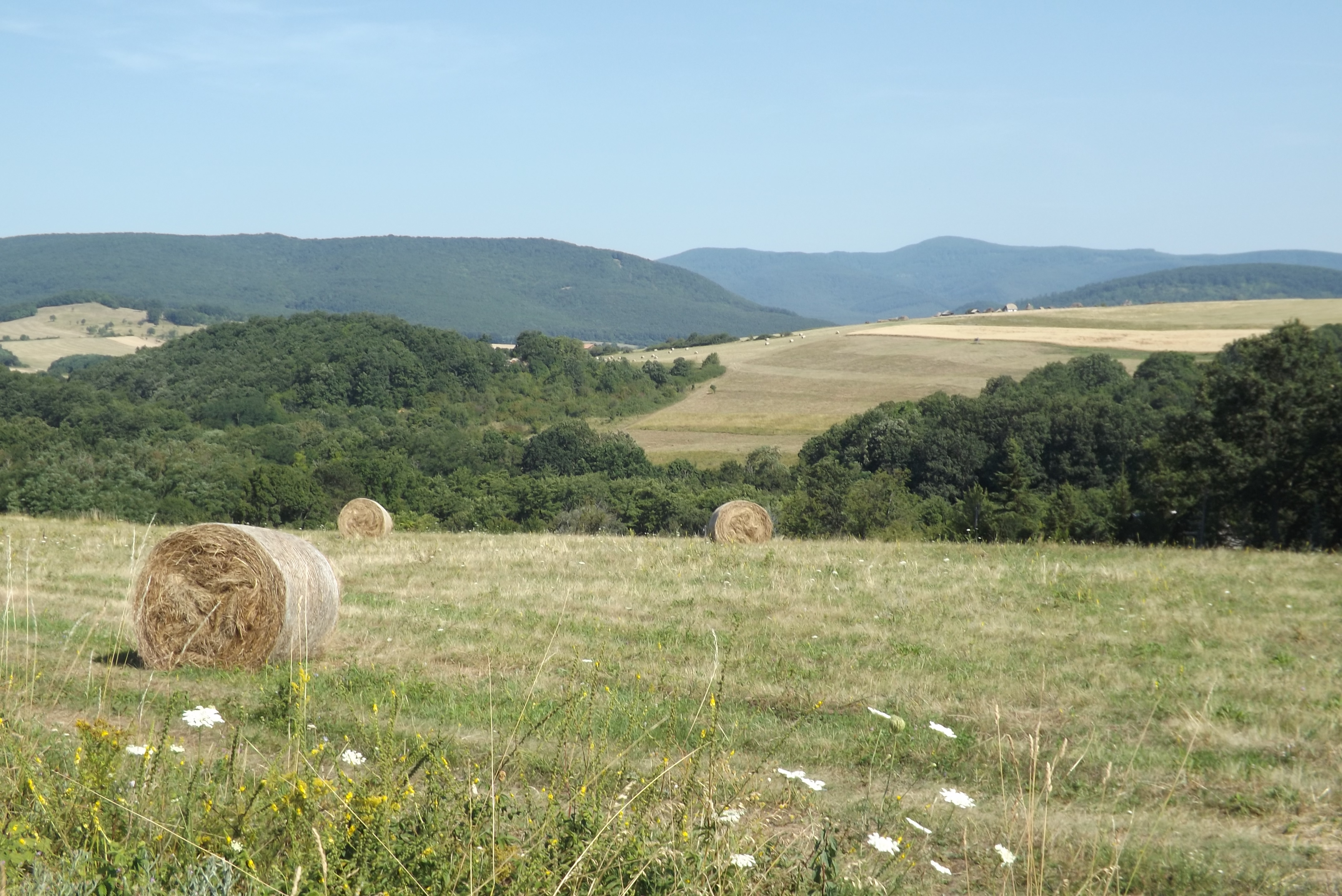 Látkép Börzsönyliget felől